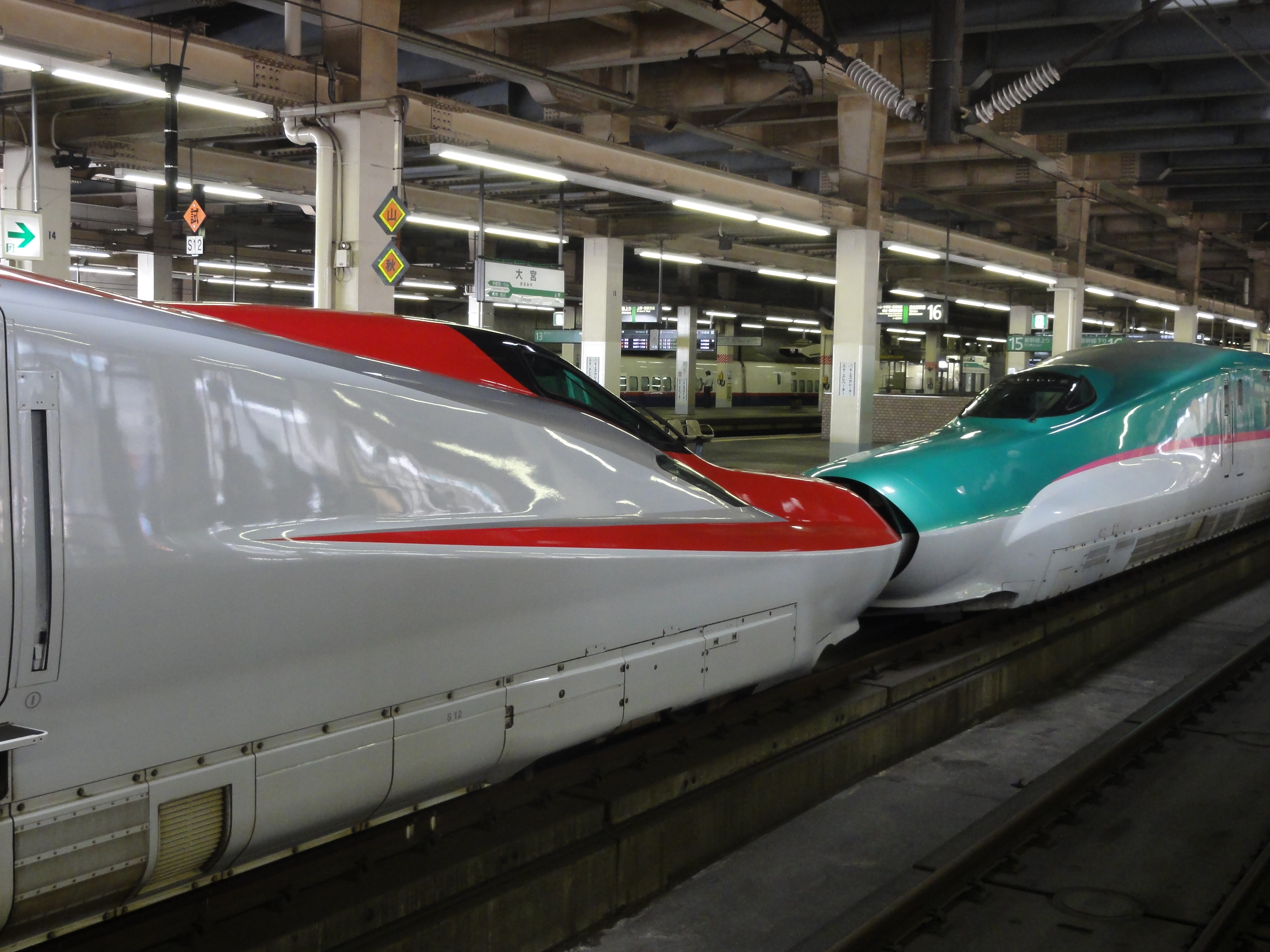 新幹線E6系（秋田新幹線用）・E5系